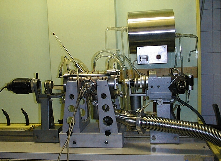 High-vacuum furnace with optical systems and digital camera for investigation the surface tension of liquid metals. Fémolvadék felületi feszültségének vizsgálatára szolgáló vákuum csőkemence optikai érzékelővel és fotózási lehetőséggel